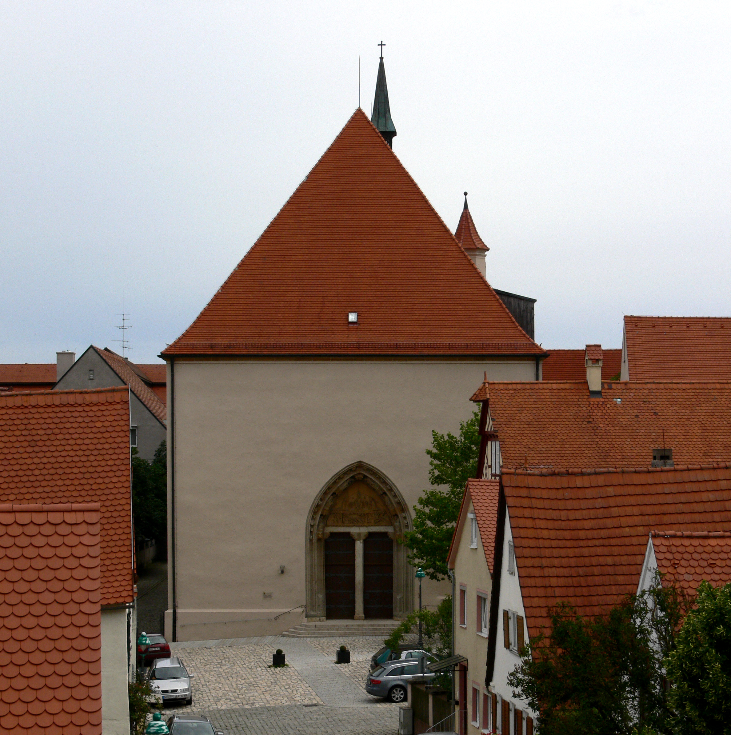 Nördlingen, Blick von der Stadtmauer Eingangsfront der St.-Salvator-Kirche